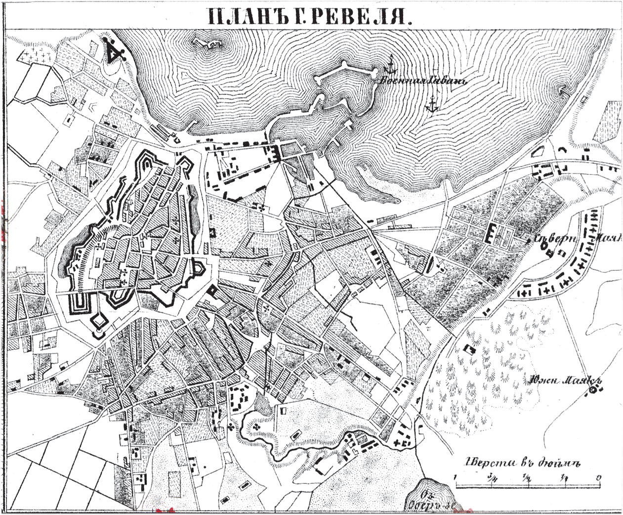 План города Ревеля 1876 года